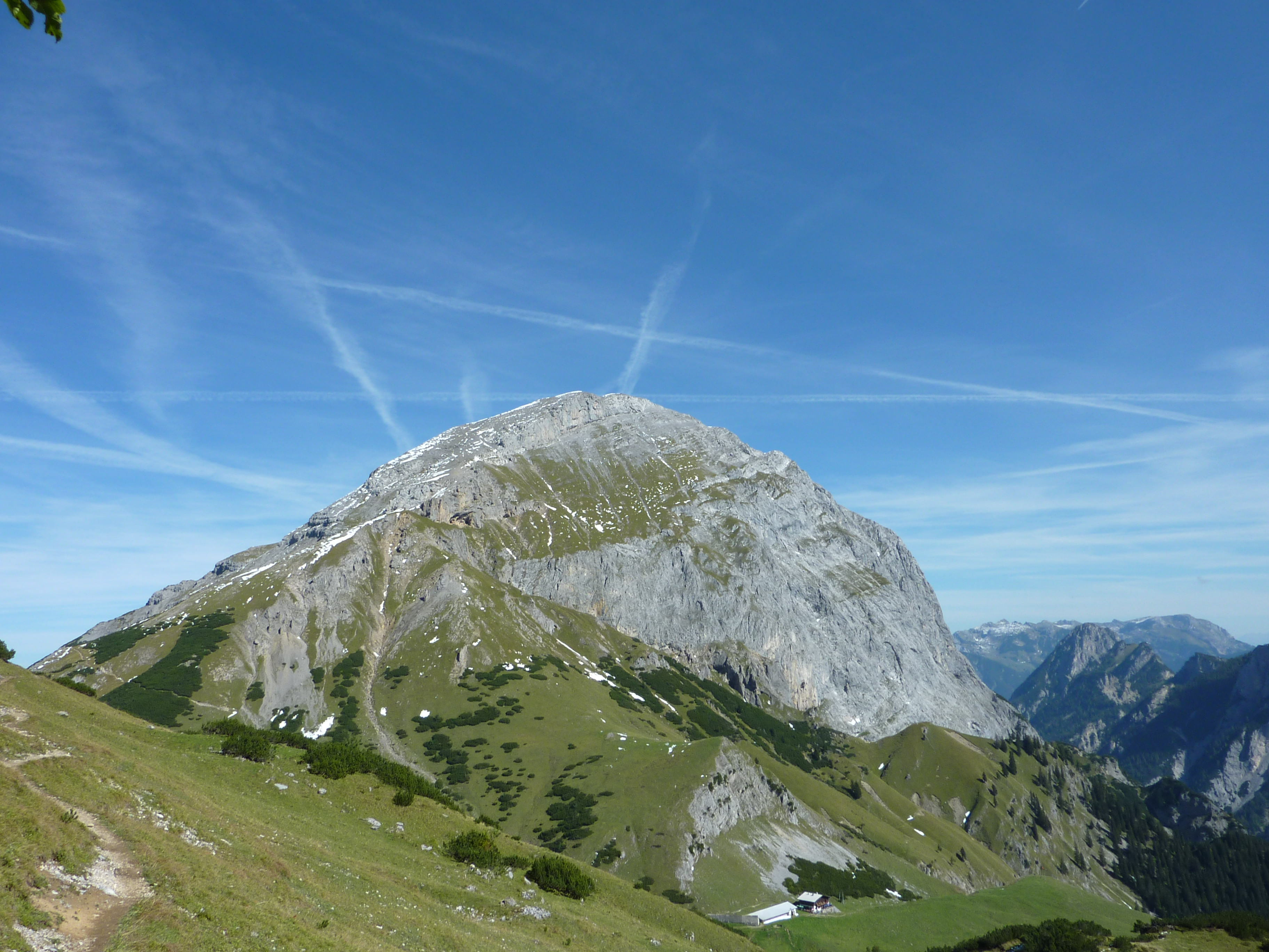 Sonnjoch in Karwendel